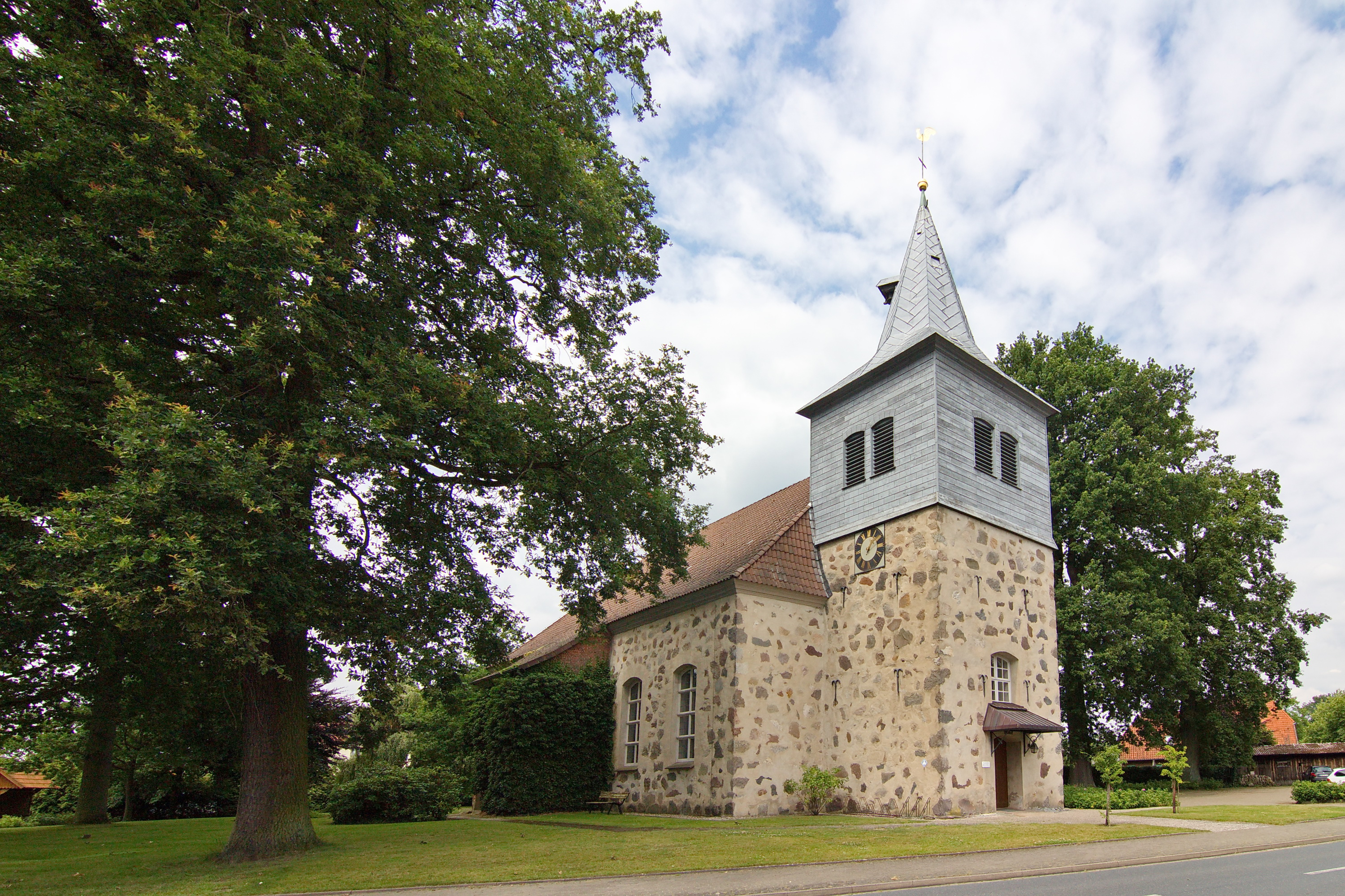 Heilig-Kreuz-Kirche von 1805 in Brockel, Niedersachsen, Deutschland